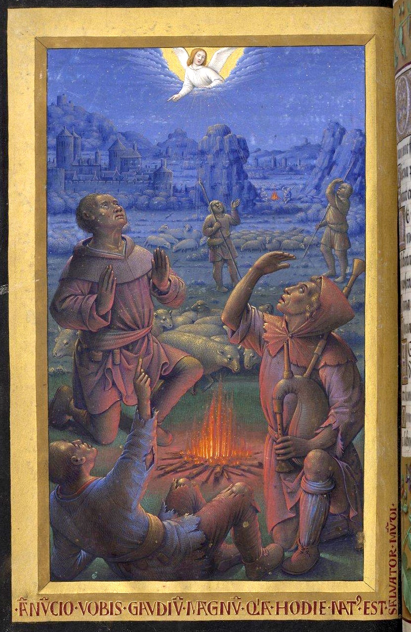 Fol. 58v - Annonce aux bergers